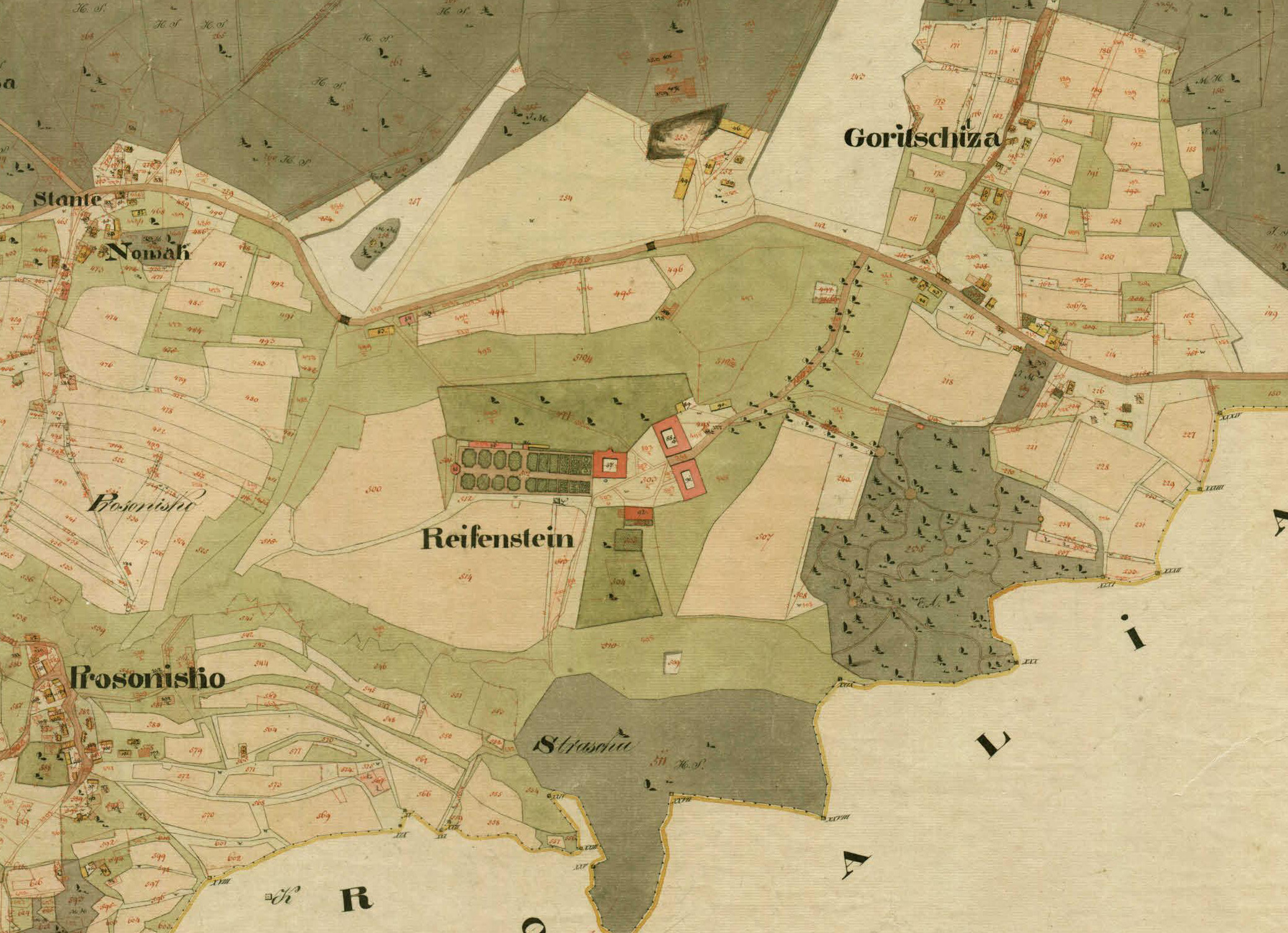 Franciscejski kataster za Štajersko, 1823-1869